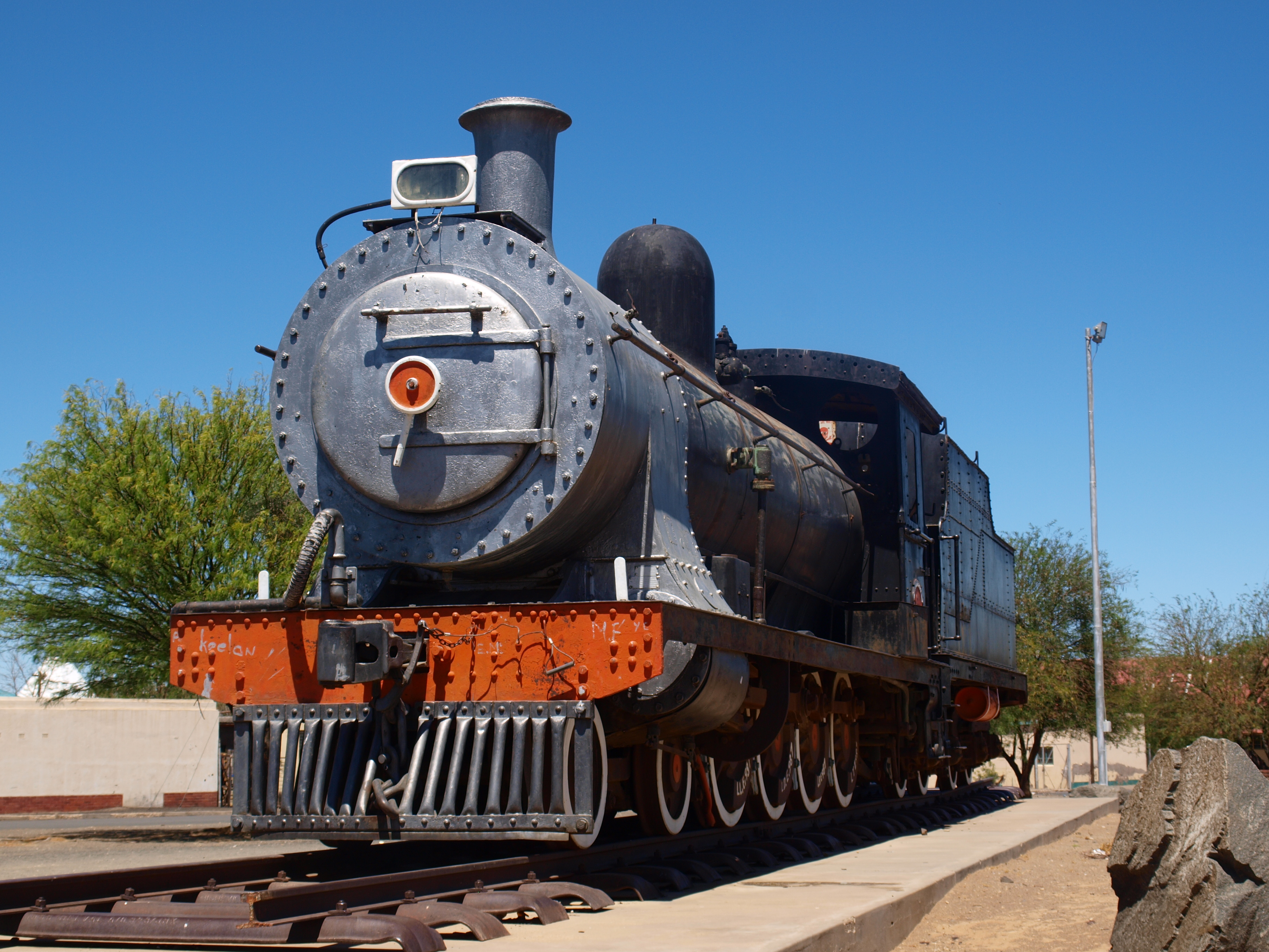 Ausrangierte Dampflokomotive am Bahnhof Keetmanshoop, die ungefähr 1980 aufgestellt wurde. Es handelt sich um die Baureihe 7A mit der Nr. 1011. Die Lok wurde 1896 von Neilson and Company in Glasgow mit der Fabriknummer 4930 gebaut und als Nr. 728 an die Cape Government Railway geliefert. Sie war bei der Nachfolgegesellschaft SAR bis ca. 1972 im Einsatz.